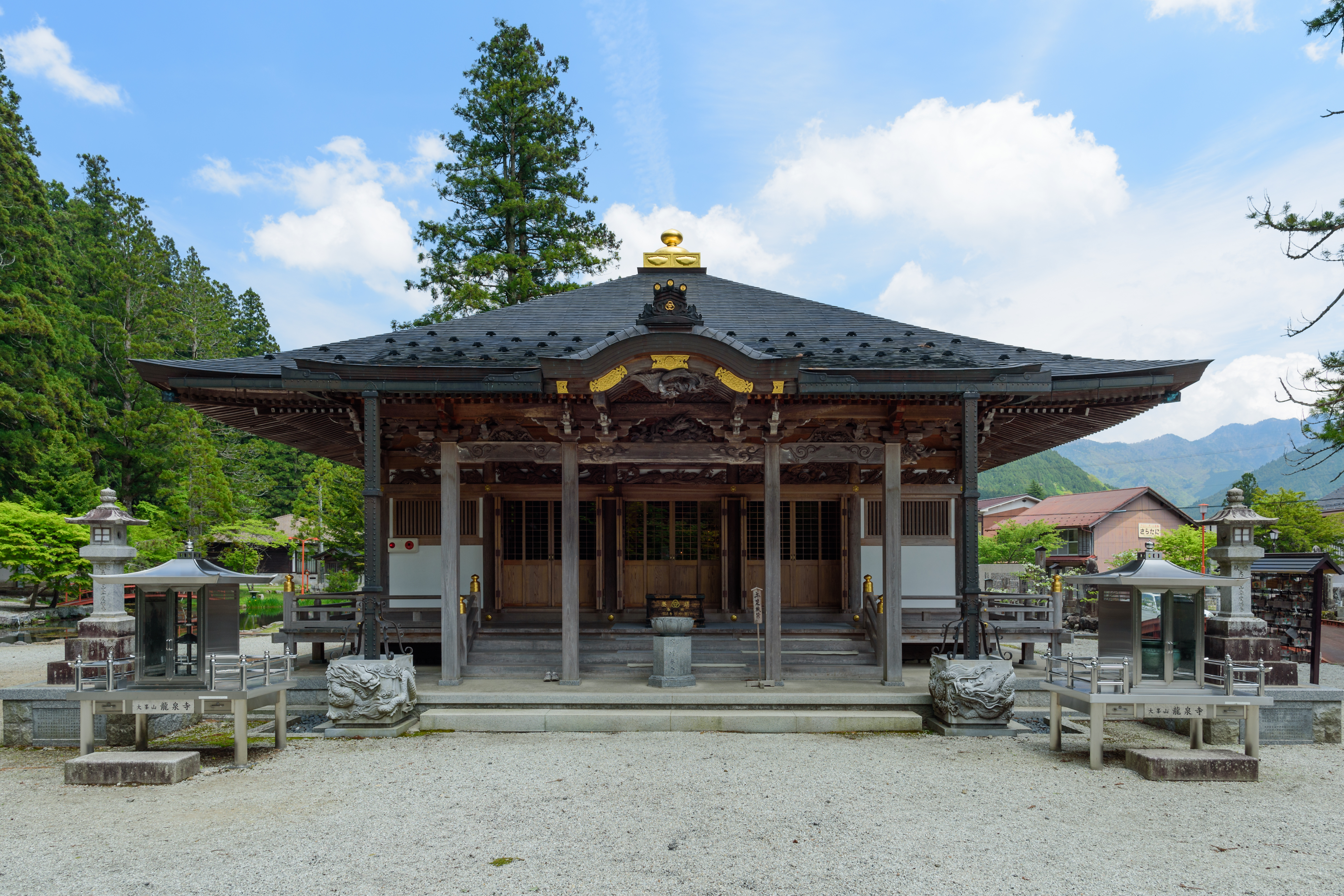 洞川の龍泉寺八大龍王堂